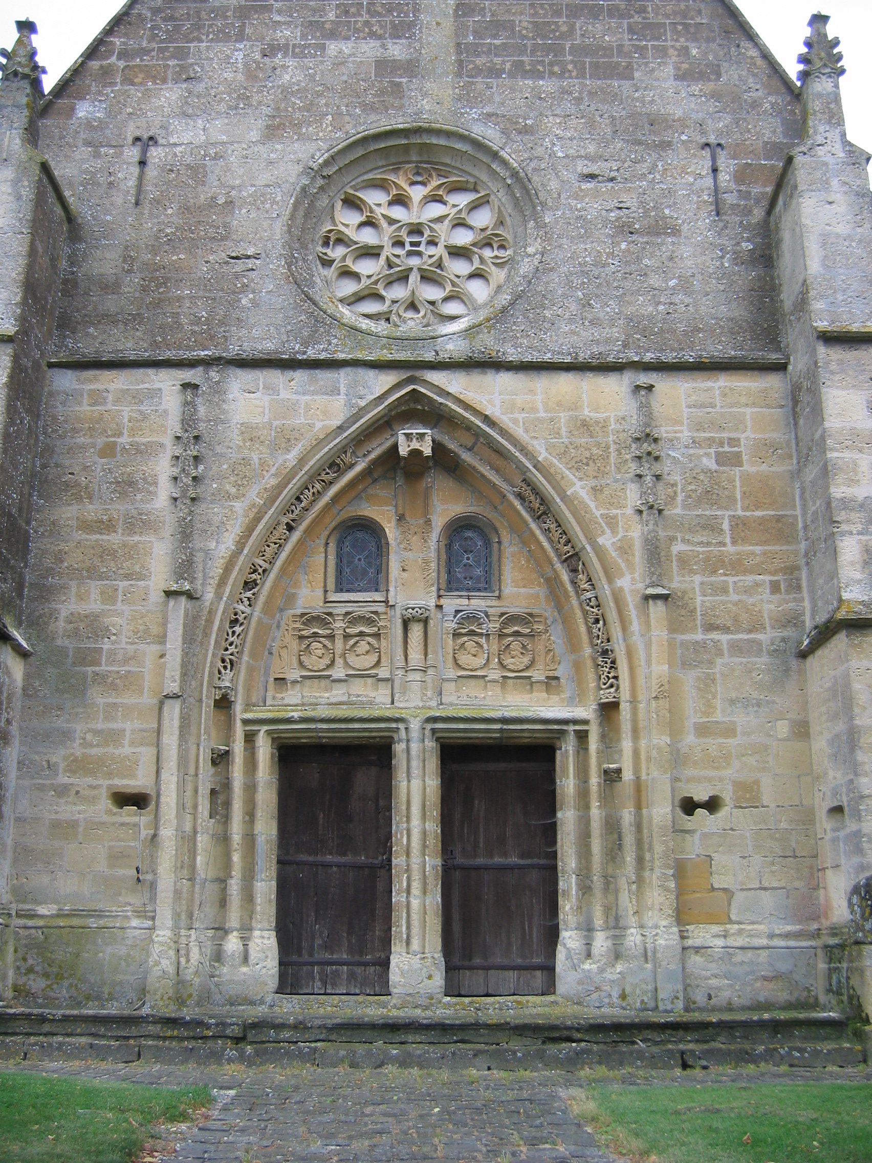 Portail de l'église de Grivy-Loisy, en Ardennes (France)